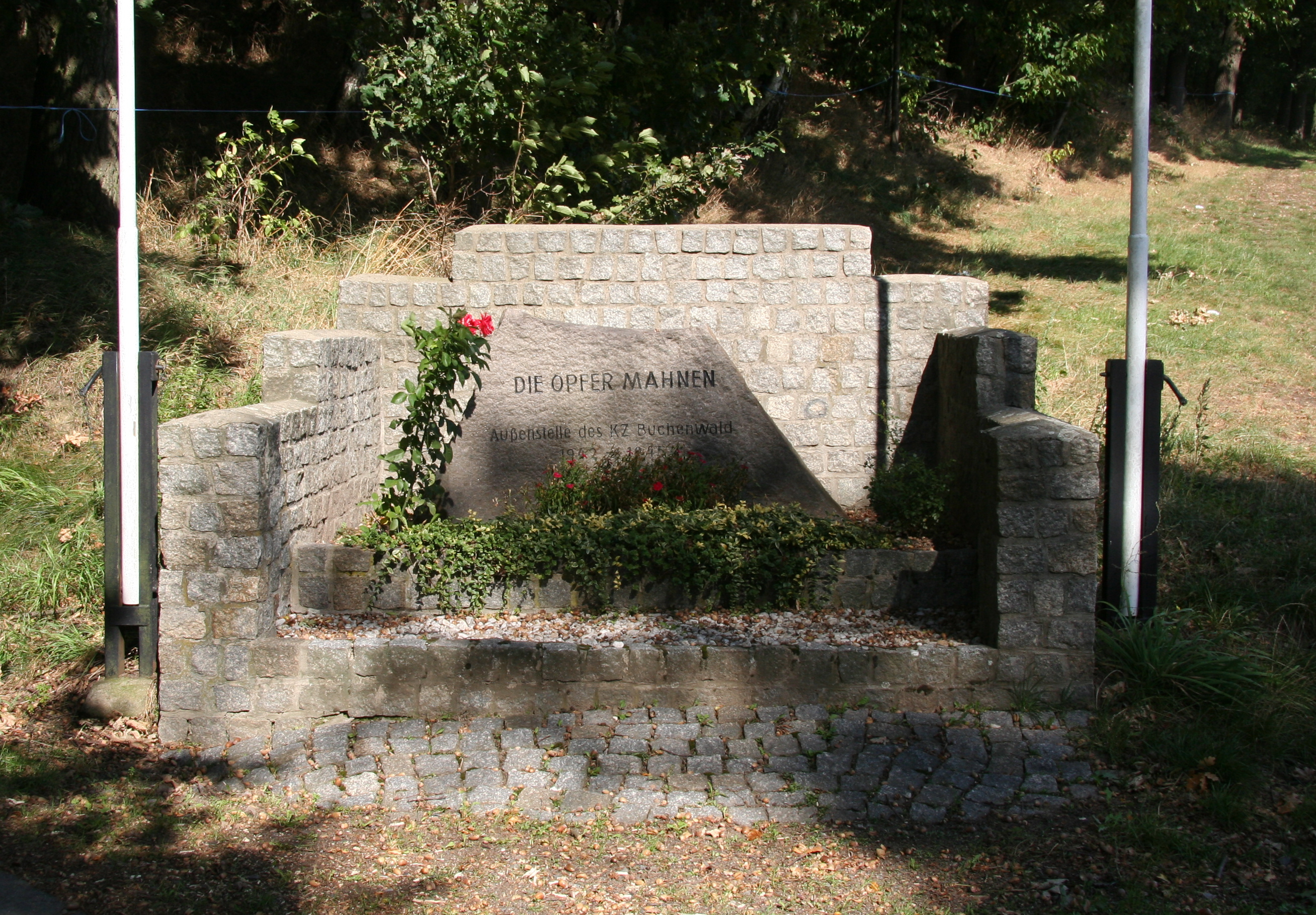 Gedenkstein für die Opfer des KZ Außenlager Penig an der B95 bei Wernsdorf